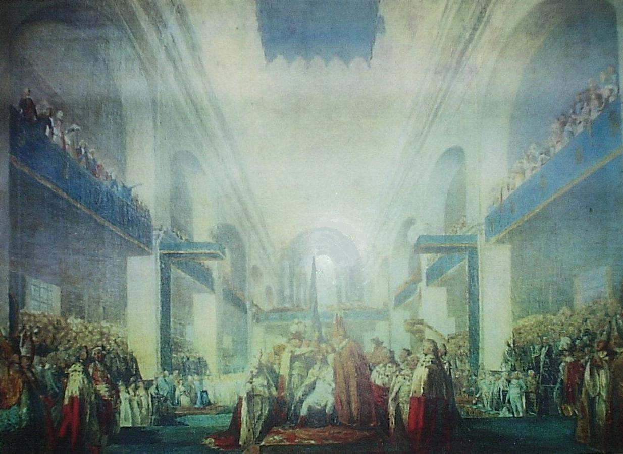 Sankt Olai kyrka i Norrköping, reproduktion av Gustav IV:s kröning den 3 april 1800 i S:t Olai kyrka. Fotograferad den 21 november 2005, av Harri Blomberg.